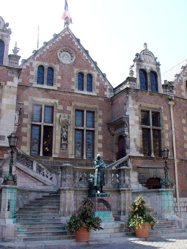 Hôtel Groslot, siège de l'Hôtel de ville d'Orléans, et statue de Jeanne d'Arc, Loiret, Centre, France.